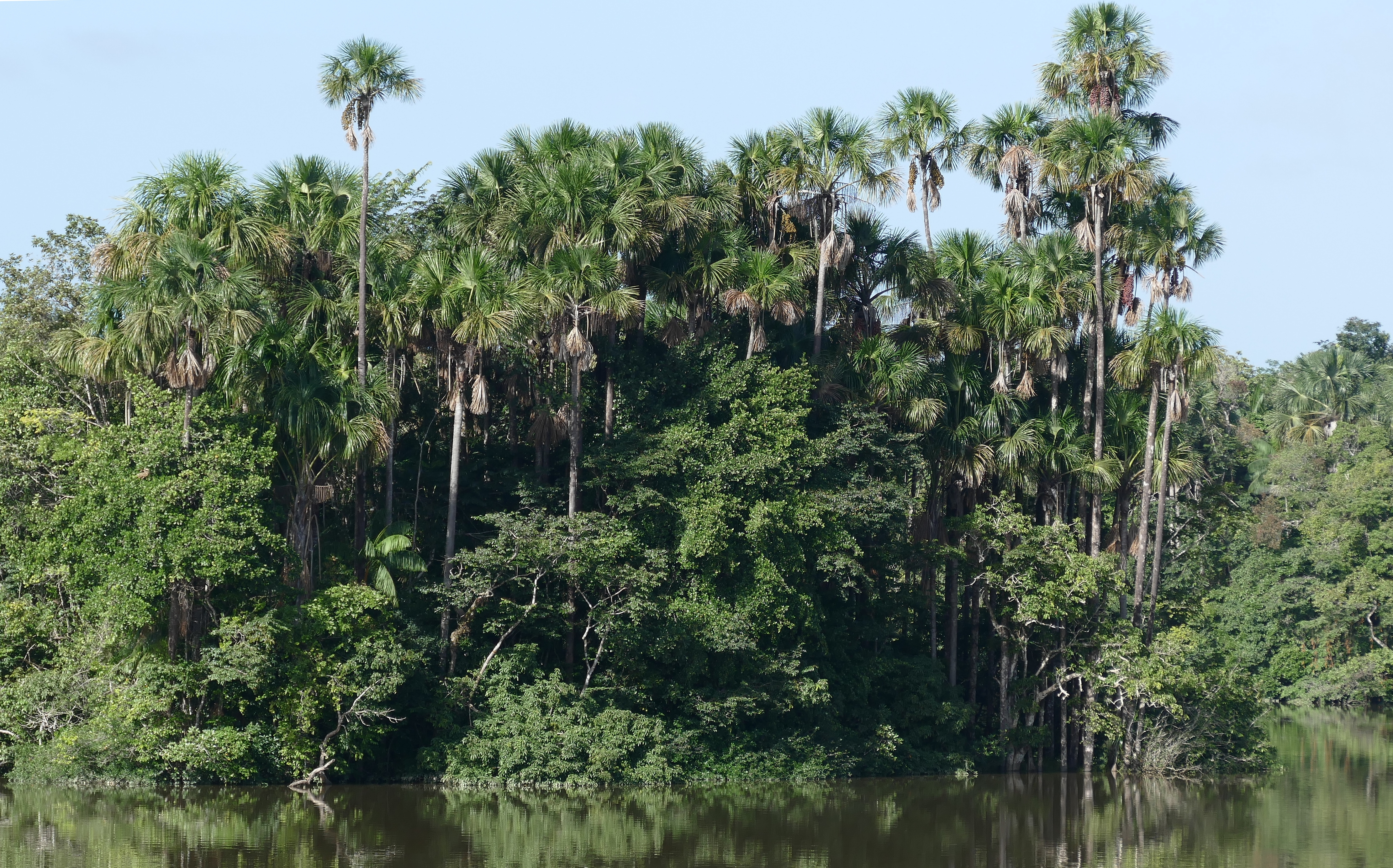 Comté Bridge, RN2, Roura, French Guyana, FRANCE